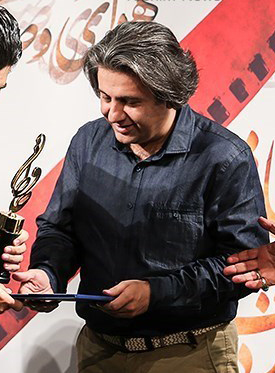 افشین یداالهی در شانزدهمین جشن سینمایی و تلویزیونی حافظ ۰۳ مرداد ۱۳۹۵